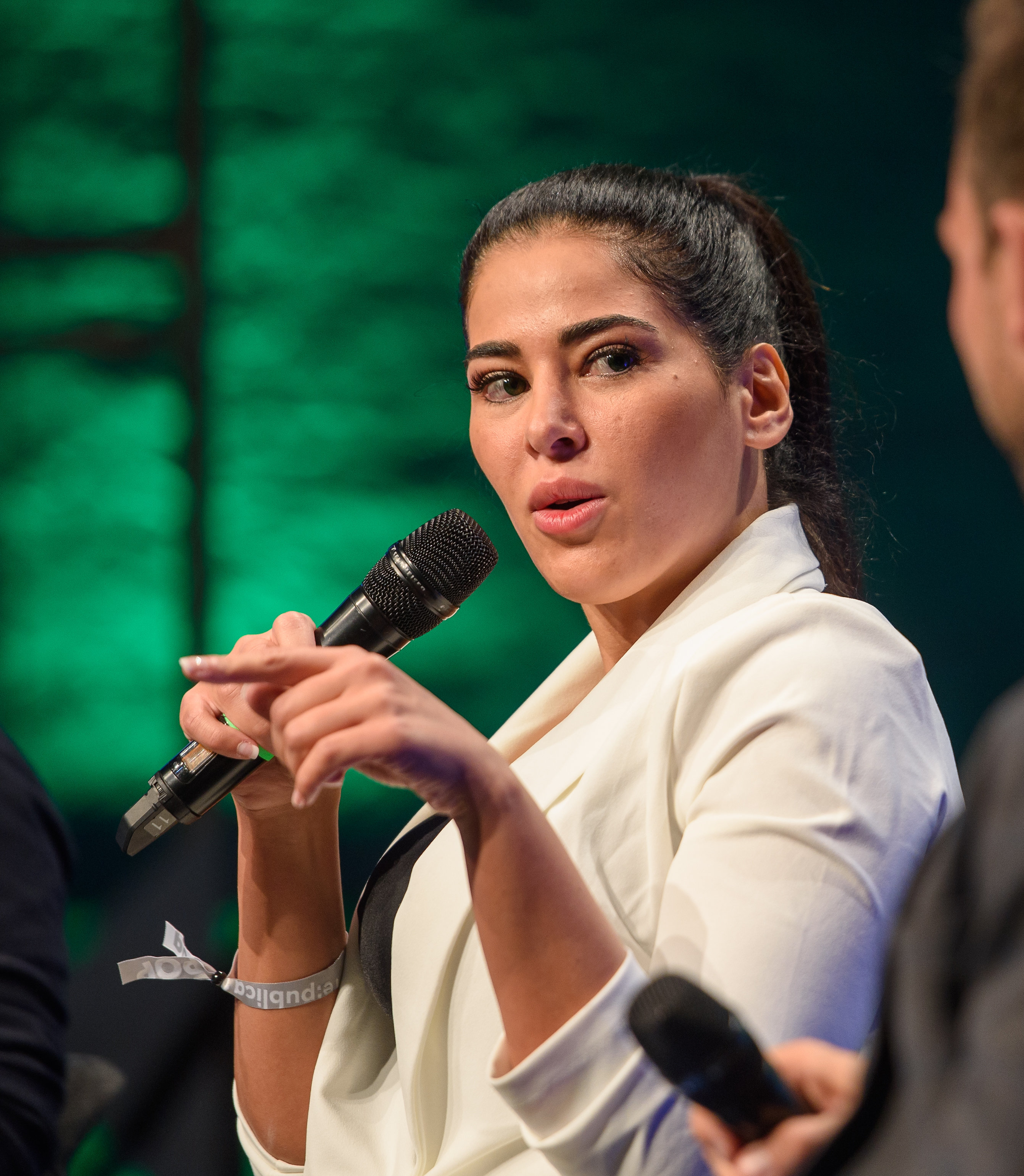 02.05.2018, Berlin: Discussion: Eröffnungspanel: Die Revolution disst ihre Kinder - alte Linke, neue Rechte und das Internet Speaker: Friedemann Karig, Stefan Niggemeier, Samira El Ouassil, Nils Markwardt. Die re:publica ist eine der weltweit wichtigsten Konferenzen zu den Themen der digitalen Gesellschaft und findet in diesem Jahr vom 02. bis 04. Mai in der STATION-Berlin statt. Foto: Gregor Fischer/re:publica